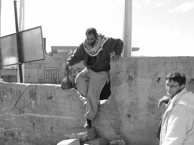 Die ehemalige Mauer bei Abu Dis 2003